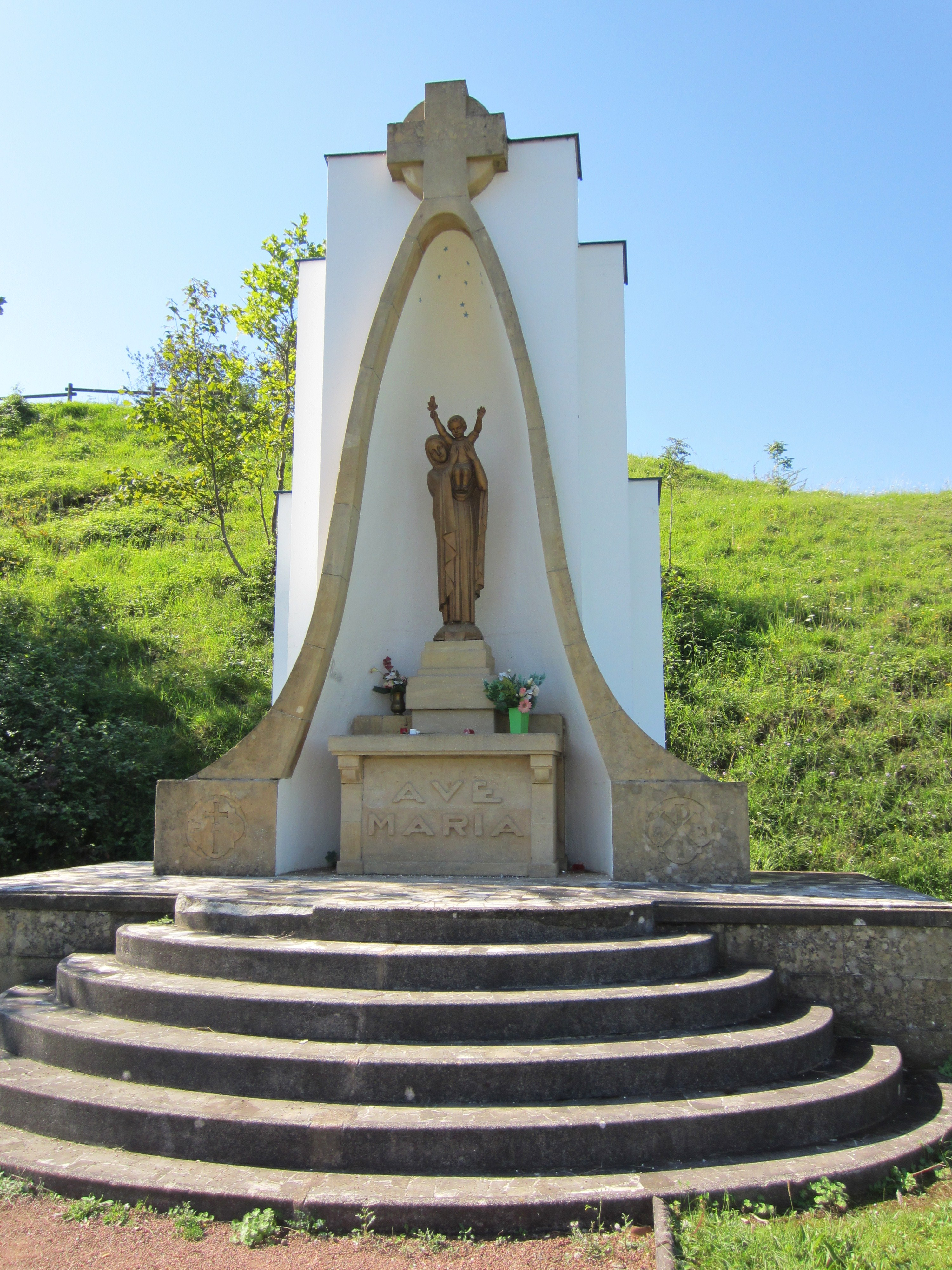 Description